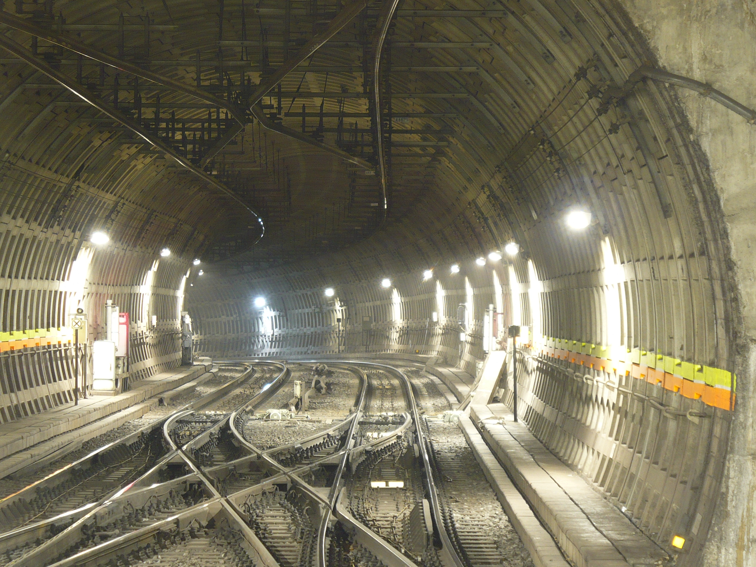 半蔵門線水天宮前駅ポイント